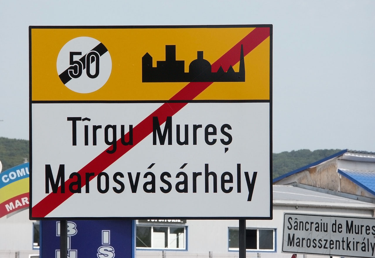 Dvojjazyčná tabule